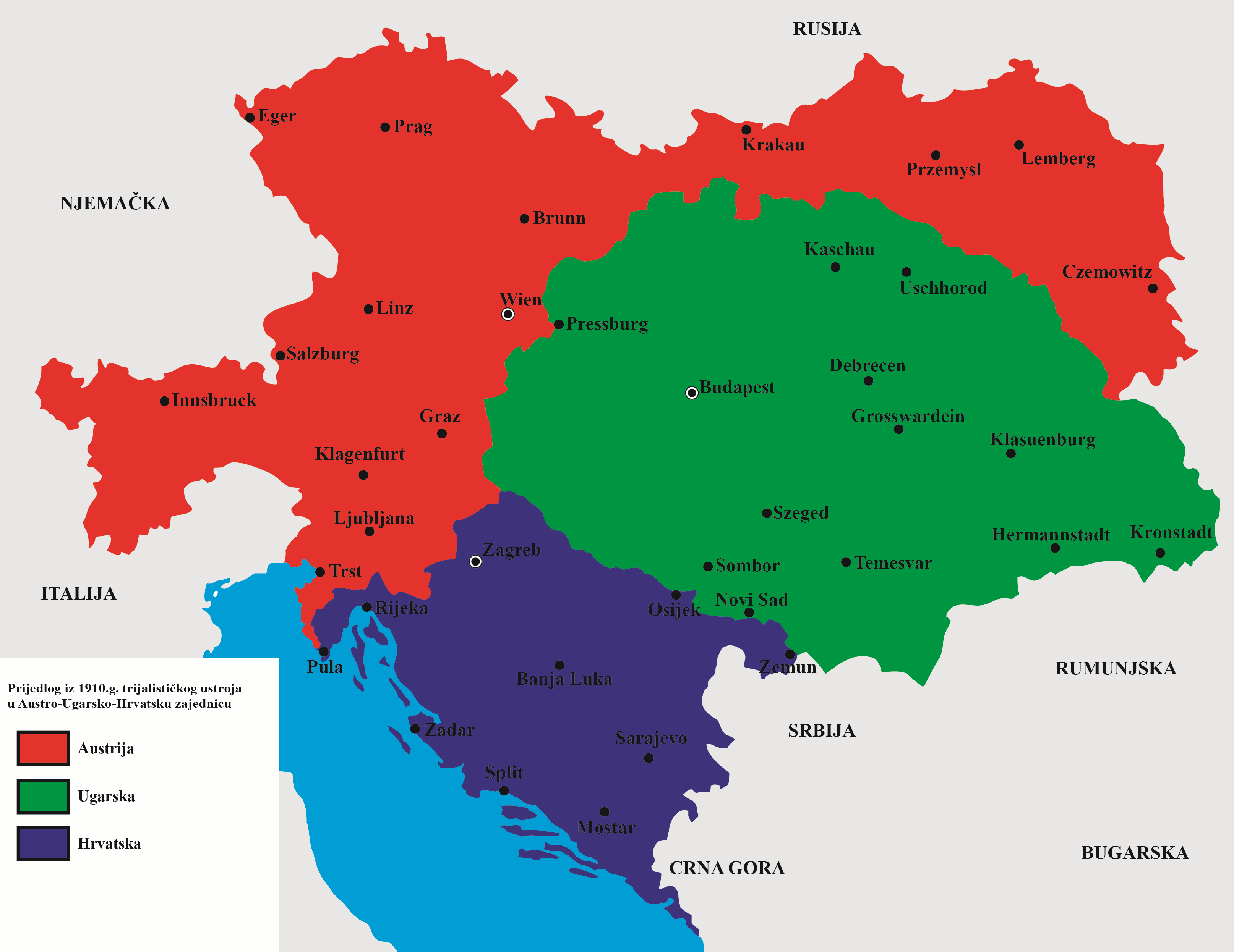 Trijalistički prijedlog prema Ivi Pilaru 1910